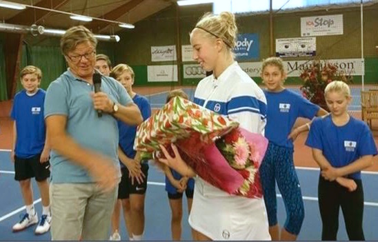 Clara Tauson som vinder af Stockholm Ladies.